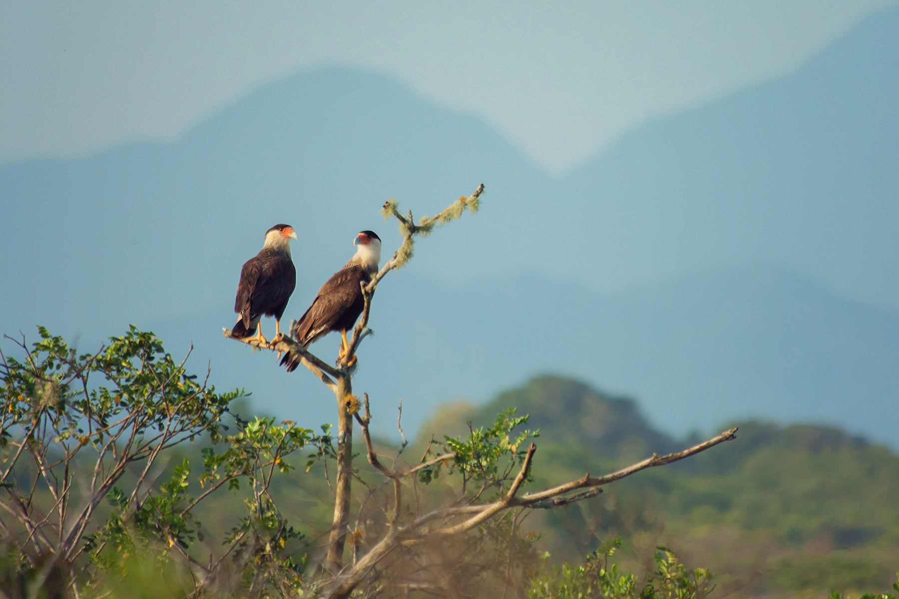 Caracara plancus, sul da ilha